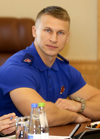 начальник Главного штаба Всероссийского военно-патриотического общественного движения «Юнармия» Дмитрий Труненков во время работы «круглого стола» по обмену передовым опытом, касающимся развития юнармейского движения в регионах России